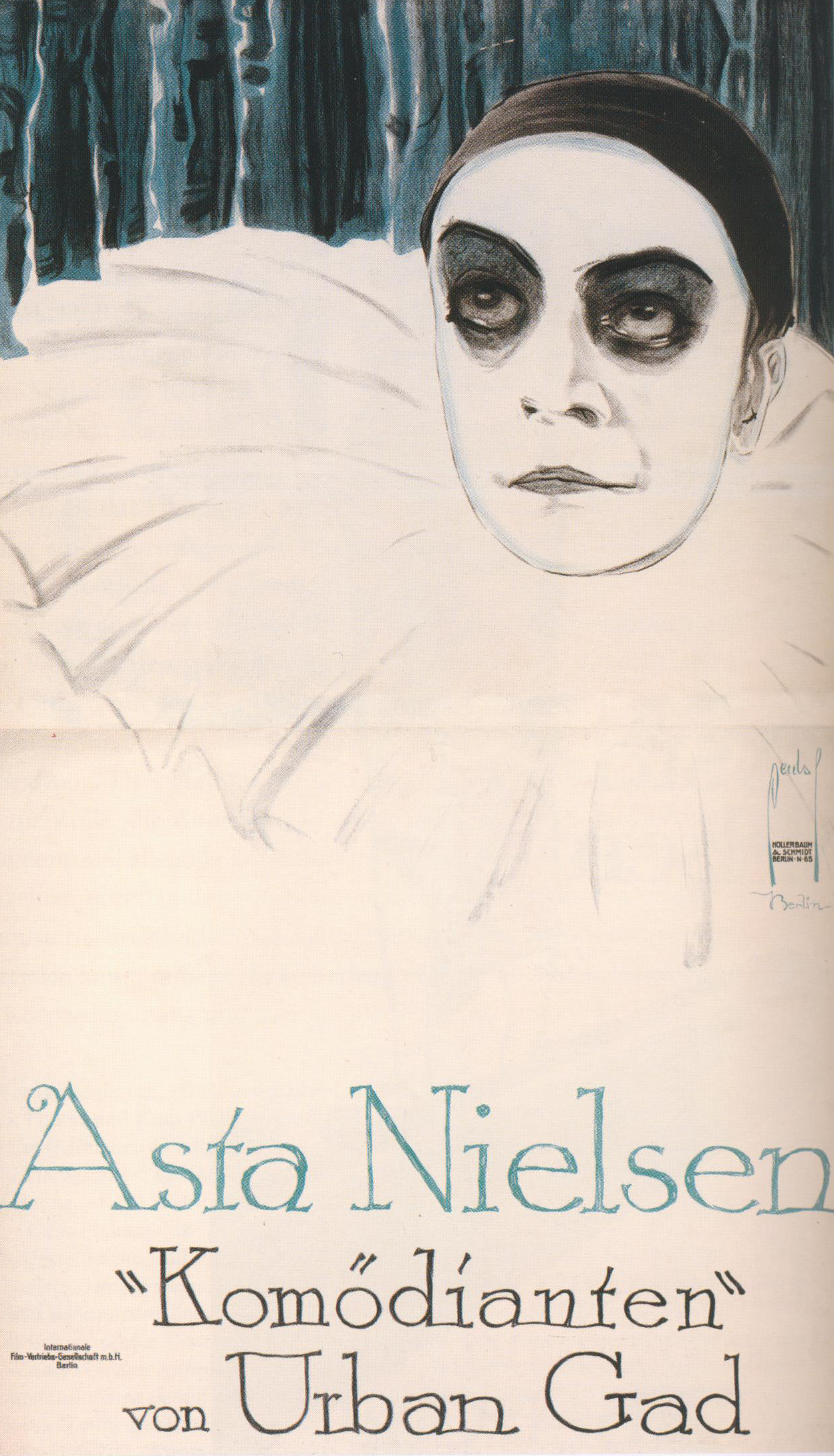 Filmposter zu Urban Gads Komödianten (1913), gezeichnet von Ernst Deutsch-Dryden; Hauptrolle Asta Nielsen